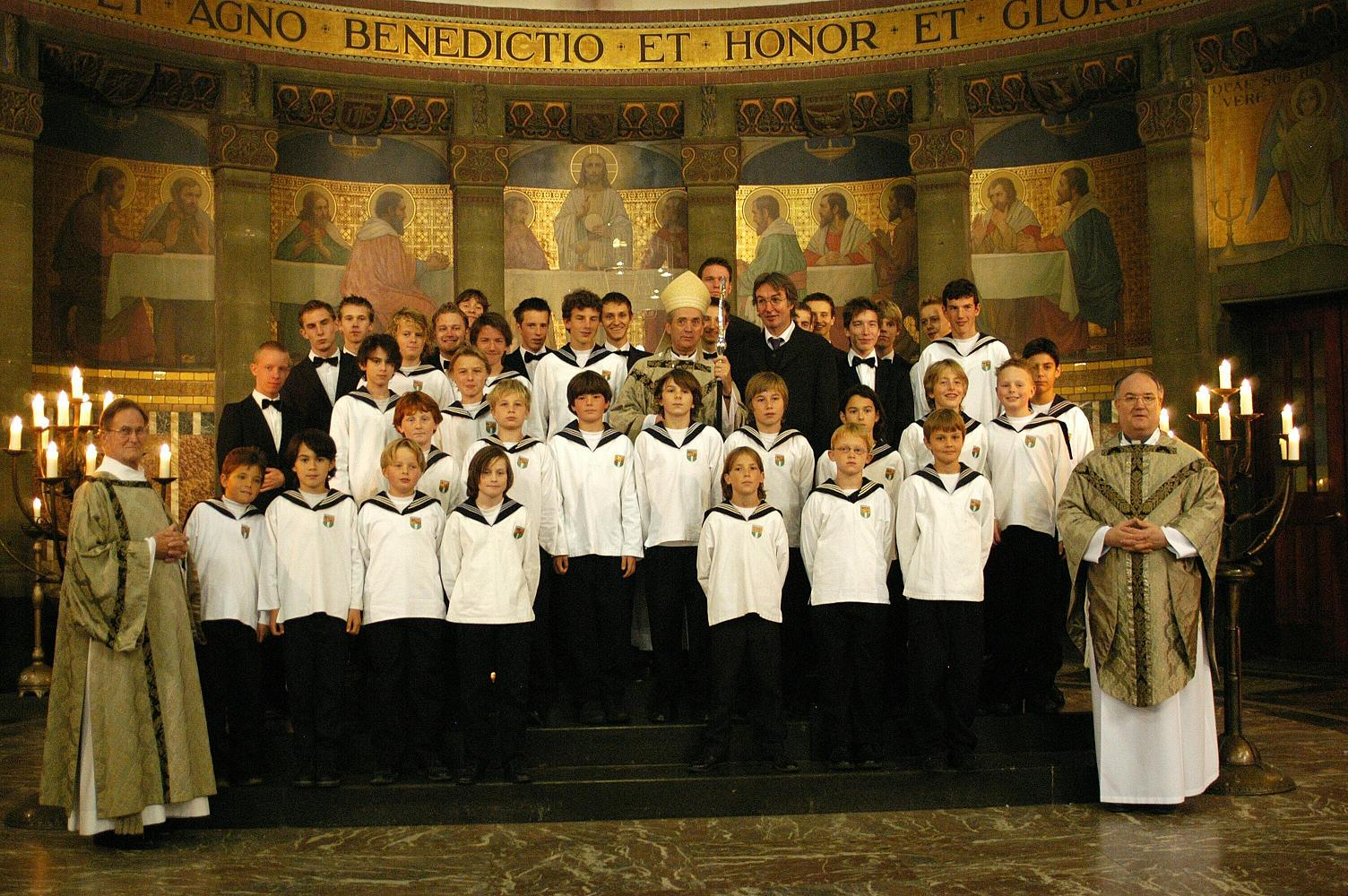 Hier staat de Rotterdamse bisschop temidden van het Rotterdams Jongenskoor, na afloop van een geweldige dienst in de kathedraal H.H. Laurentius en Elisabeth.